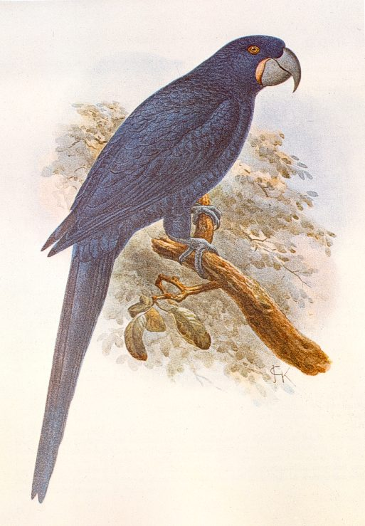 Rotschillernder Ara